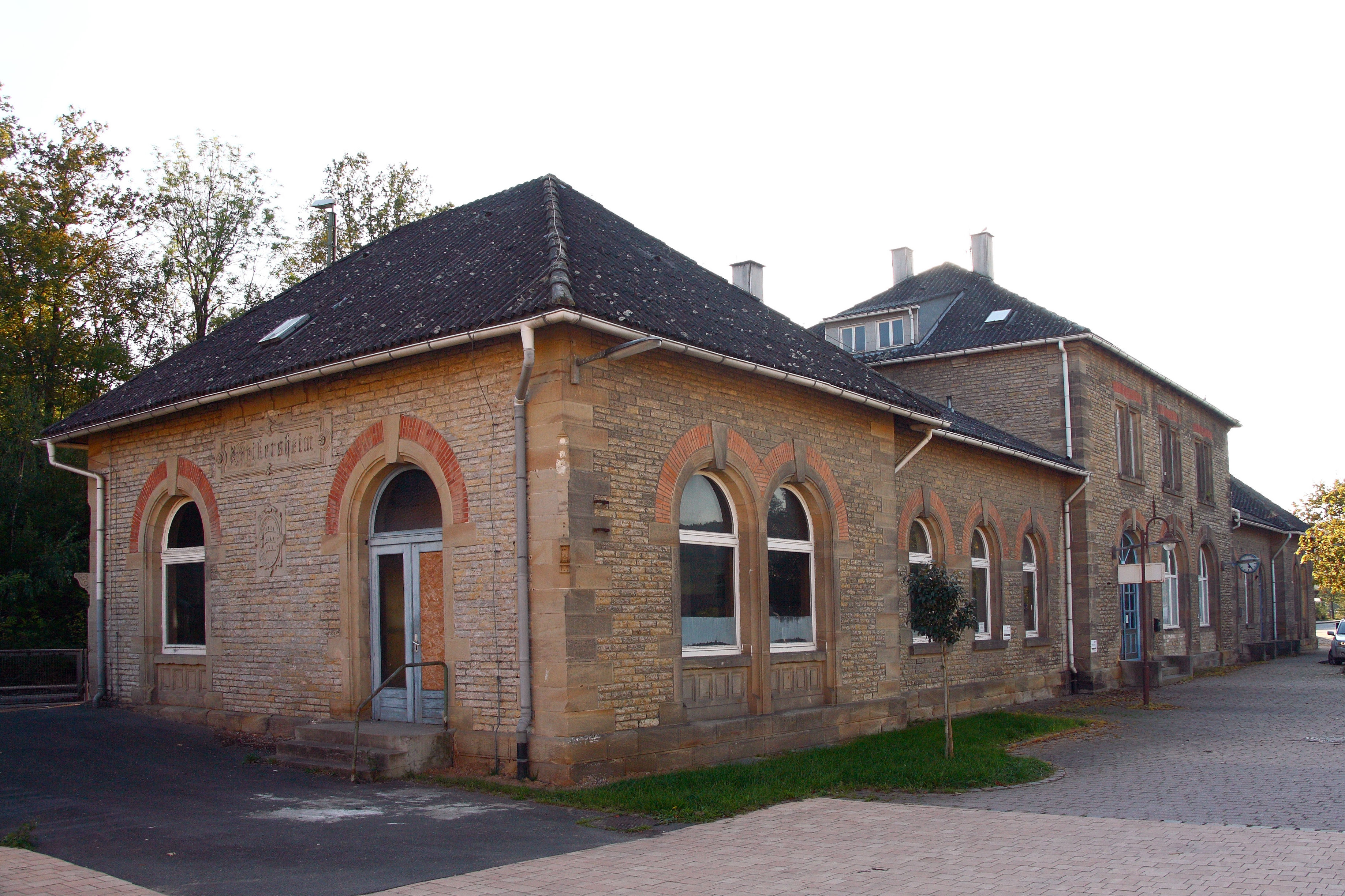 Bahnhof 1 / Empfangsgebäude des Weikersheimer Bahnhofs: Massivbau im Pavillontyp mit Walmdächern und Rundbogenfenstern (1867-70).